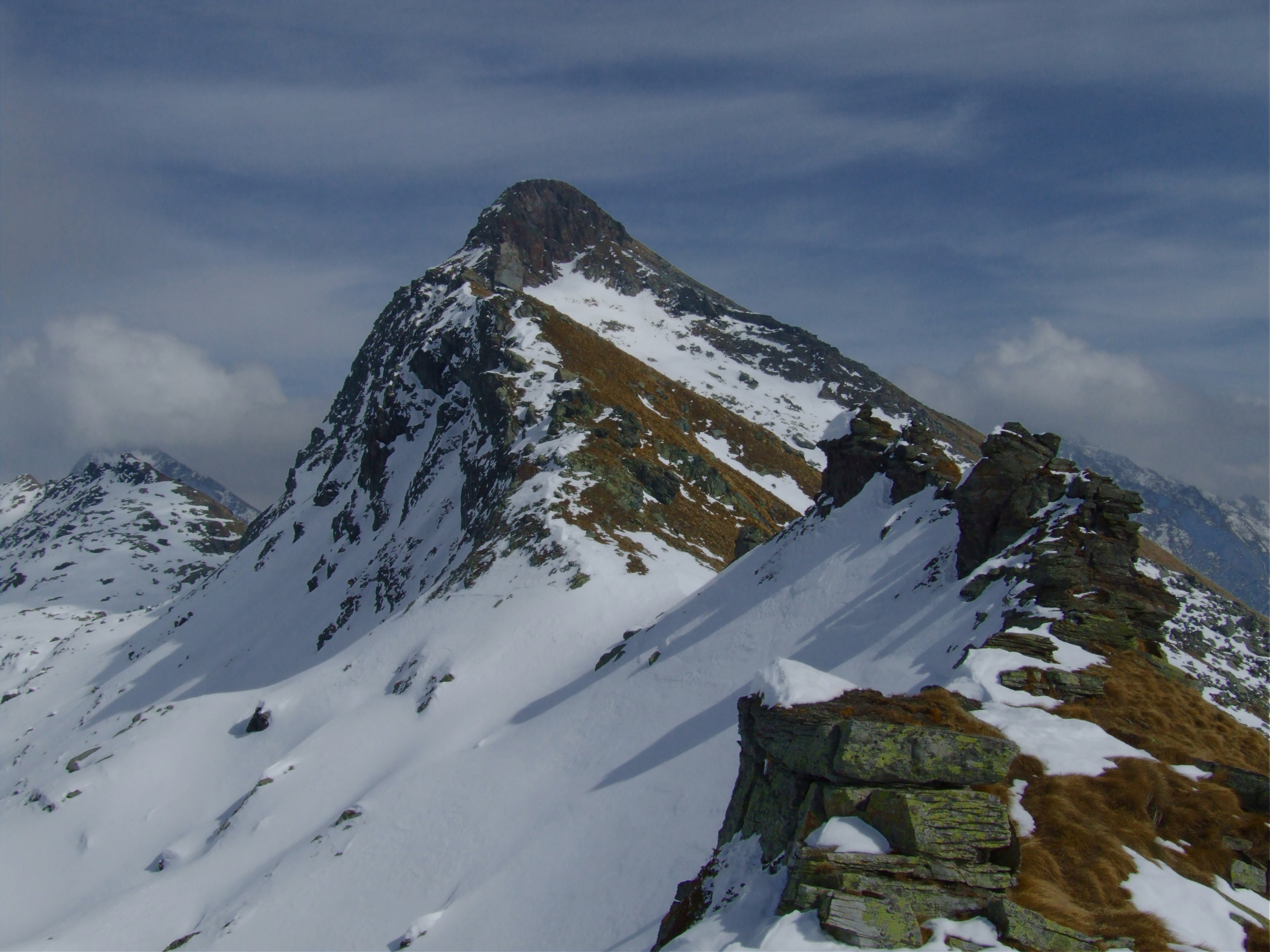 Corno d'Olen (2556 m)